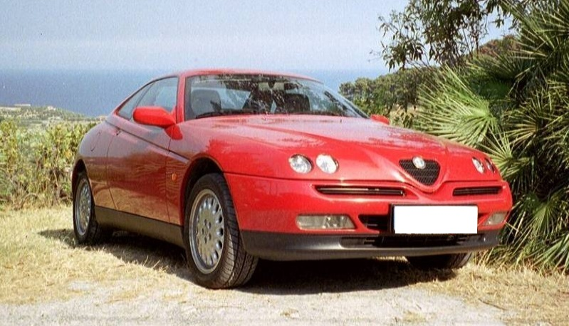 Alfa Romeo GTV T-Spark 2.0